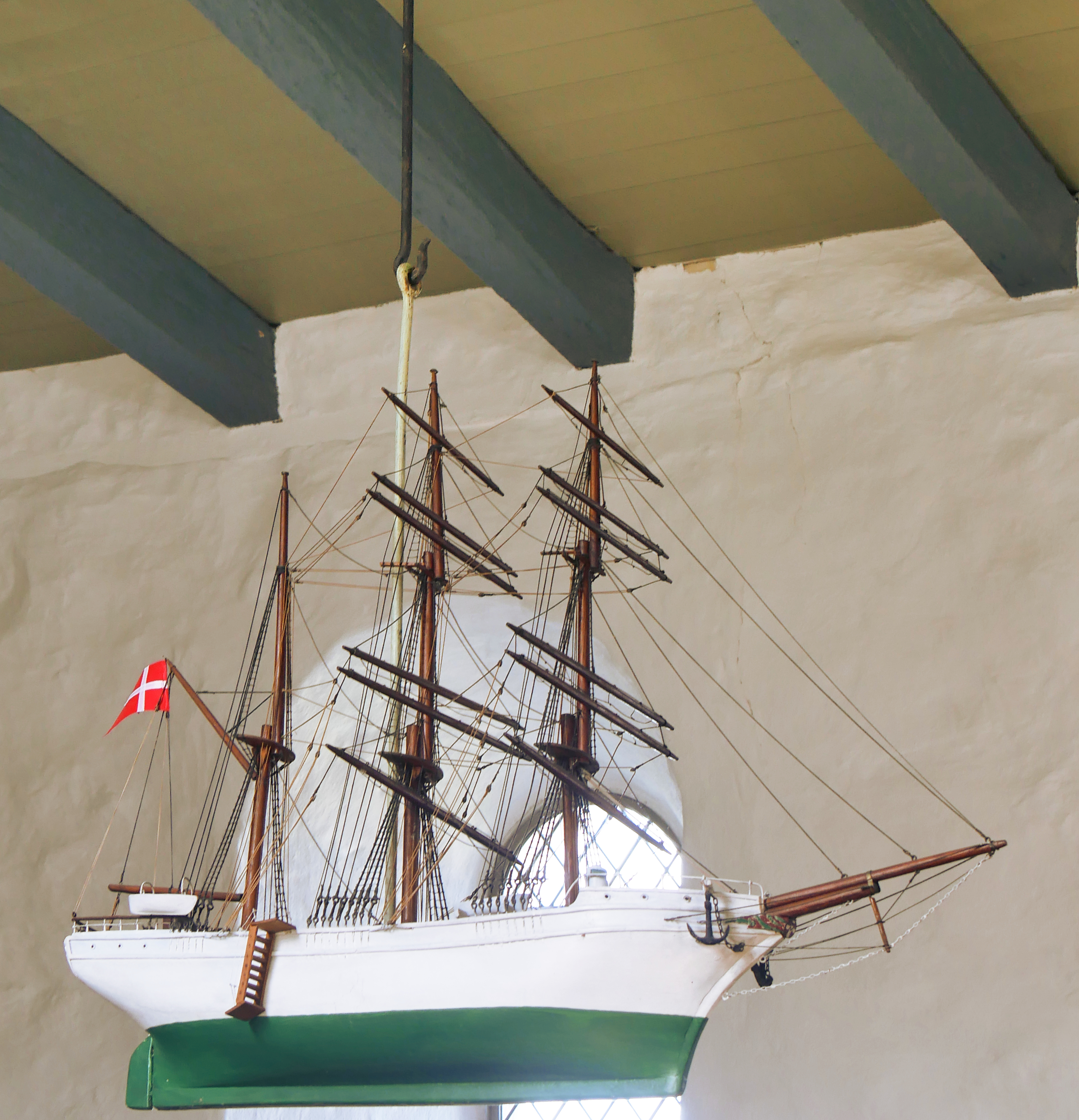 Kirche von Vive am Mariagerfjord (Dänemark, Nord-Jütland) - Erbaut etwa 1250, schöne Innenausstattung: romanischer Taufstein, Renaissacealter, Kanzel aus dem Historismus, moderne Orgel - Das dänischen Kirchen üblichen Schiffsmodell